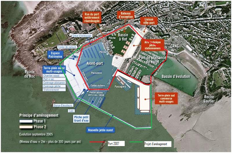 Carte du Projet de Port de Granville